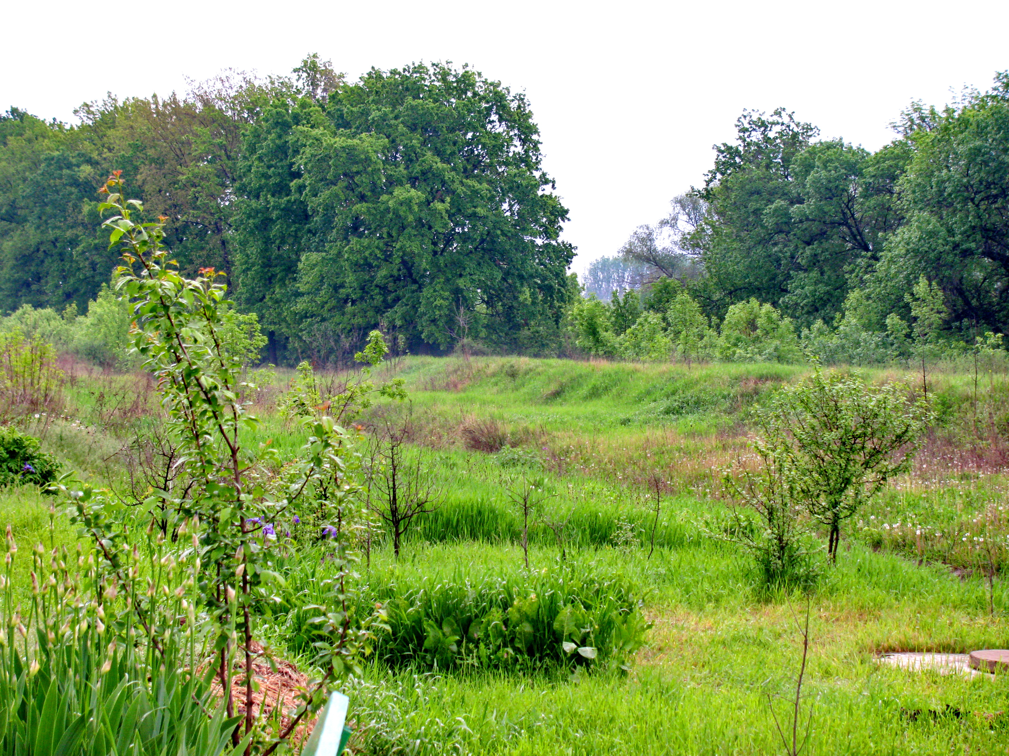 відділення «Станично-Луганське», Станично-Луганський район